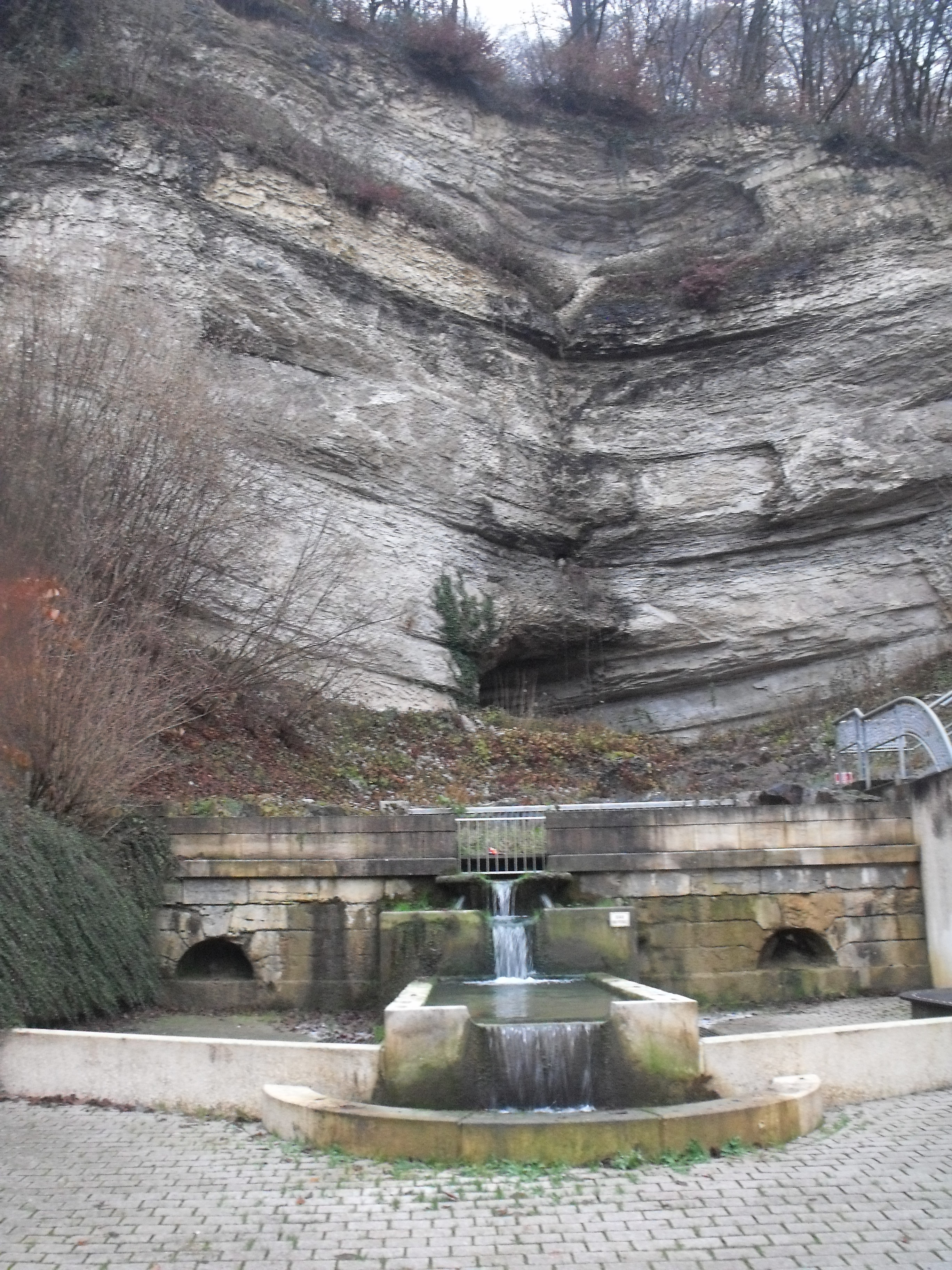 Grotte et source, Sainte Suzanne (Doubs, France)